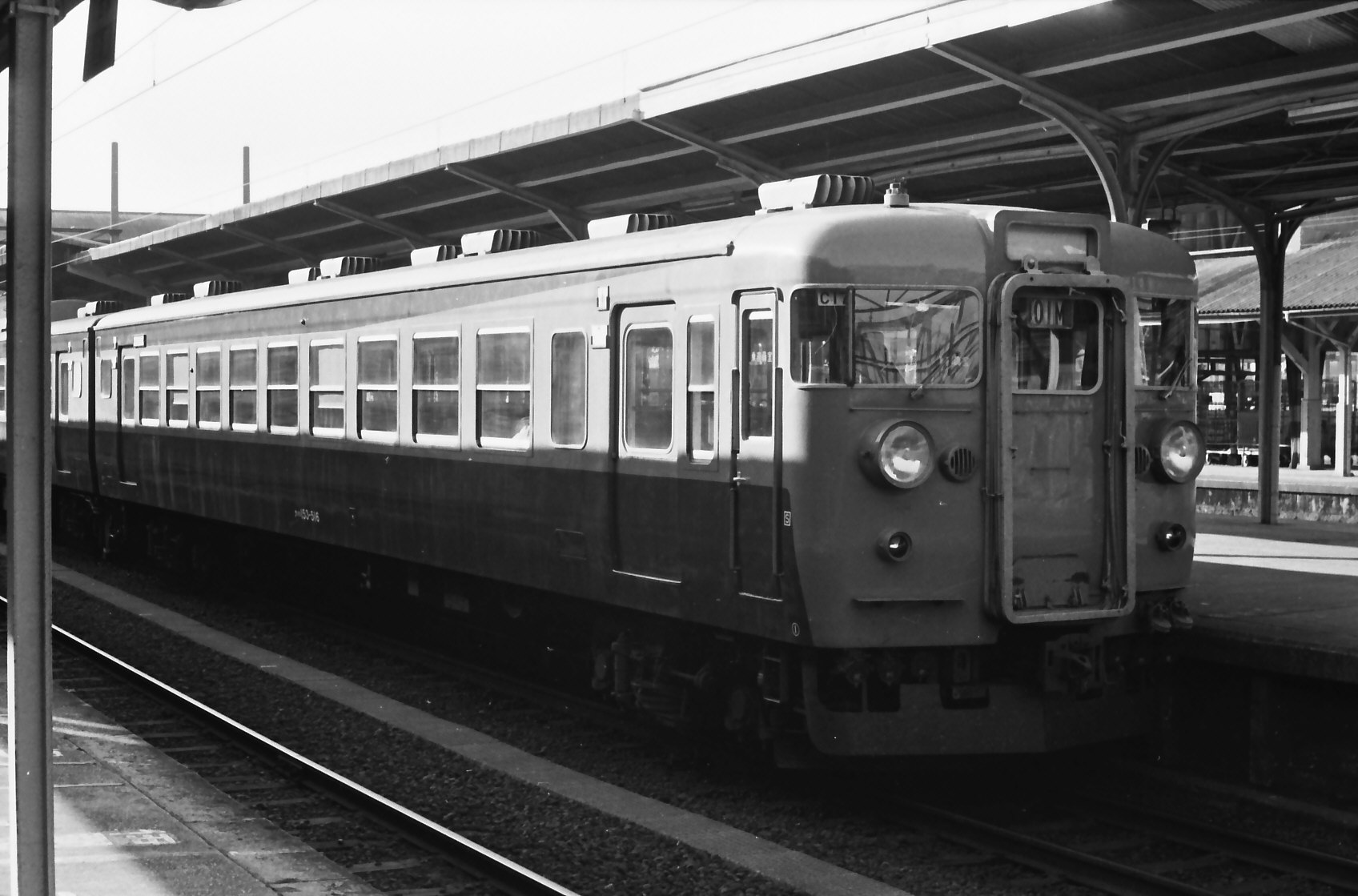 クハ１５３－５１６ 非冷房車 １９８２年撮影